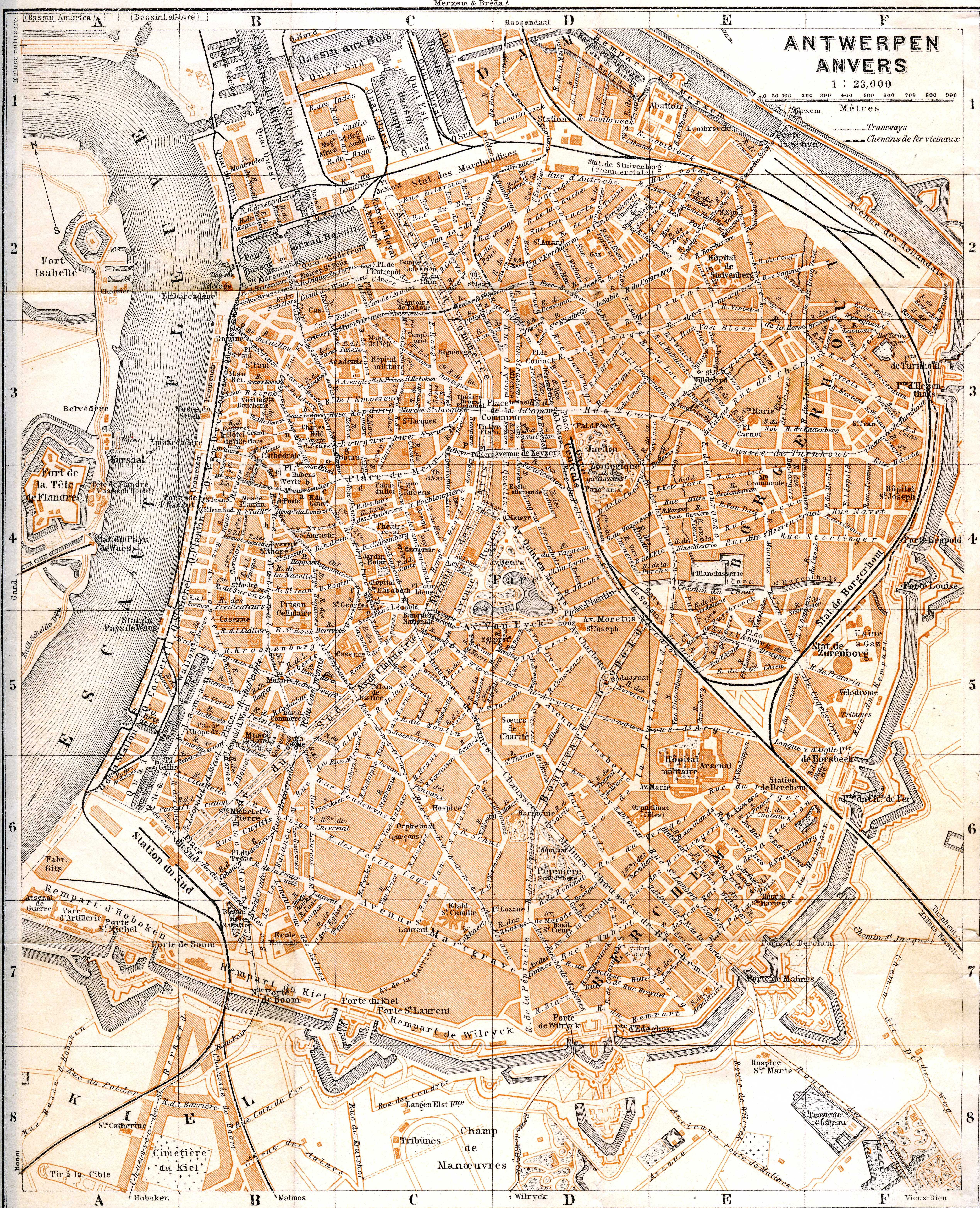 Inlegkaart van Antwerpen uit de Baedeker reisgids van 1905